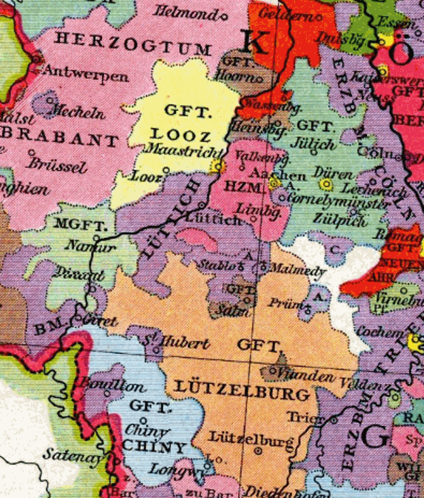 Ausschnitt aus